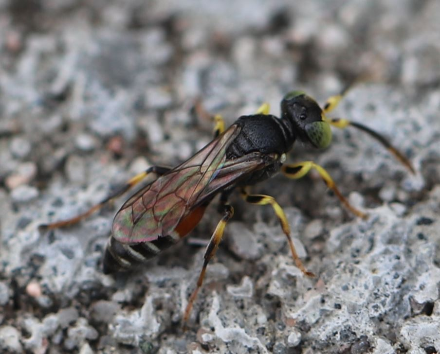 Grabwespe Harpactus elegans, Männchen, am 9. Juni 2020